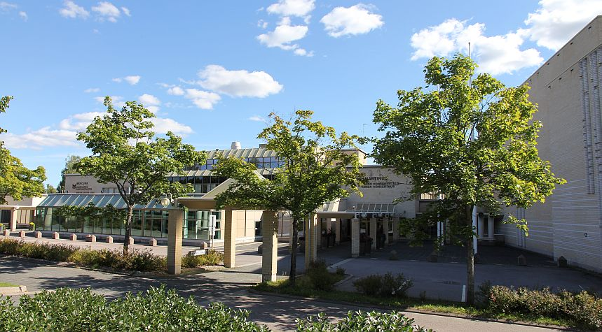 Mercuria kauppaoppilaitos, Martinlaakson lukio (kuvan vasemmassa päässä) ja konserttitalo Martinus (oikeanpuoleinen osa rakennuksesta) sijaitsevat samassa rakennuskokonaisuudessa Vantaan Martinlaaksossa. Huom: Muista säilyttää viittaus kuvaajaan, mikäli käytät kuvaa.